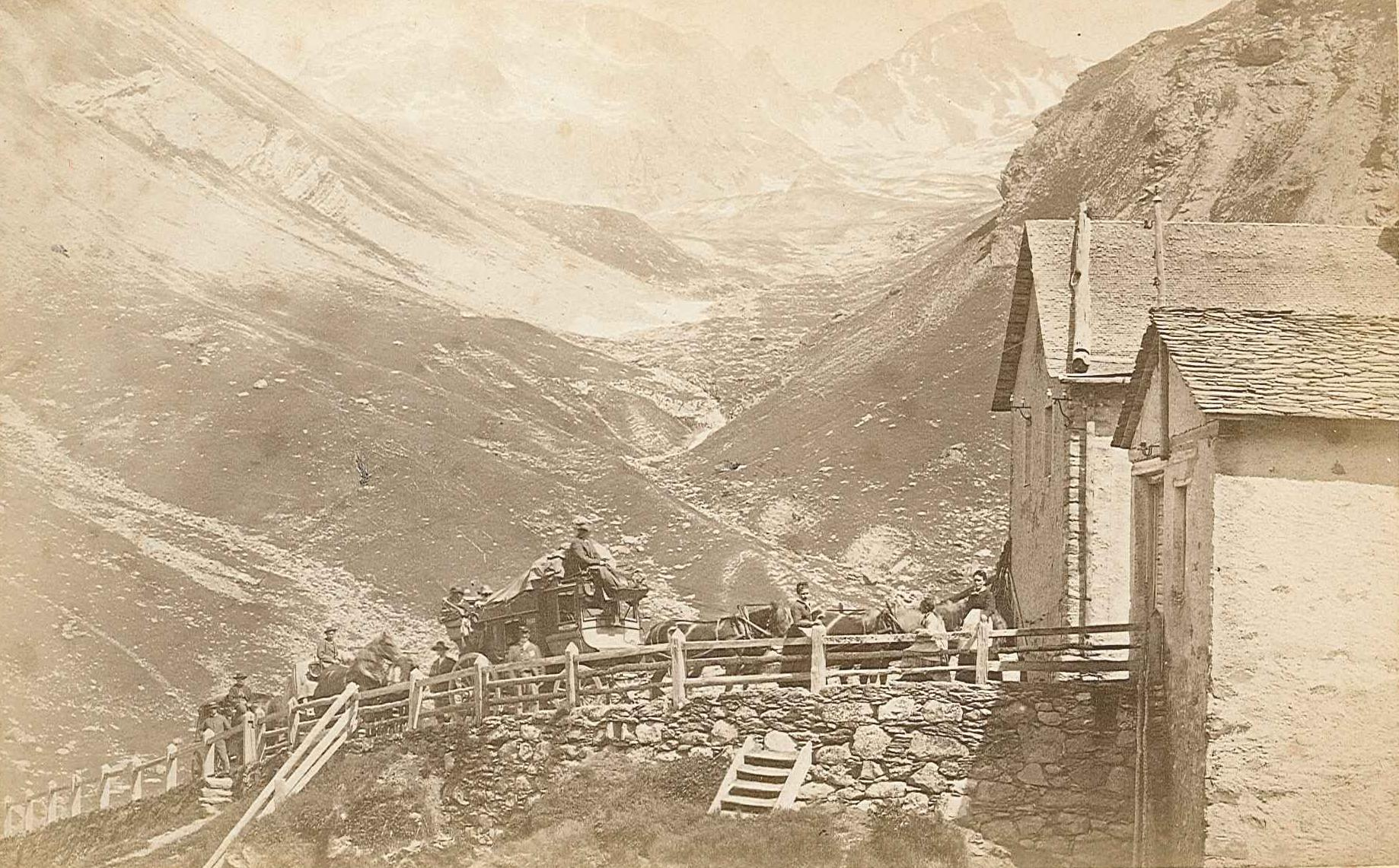 Hospice au montagne de Julier, Suisse